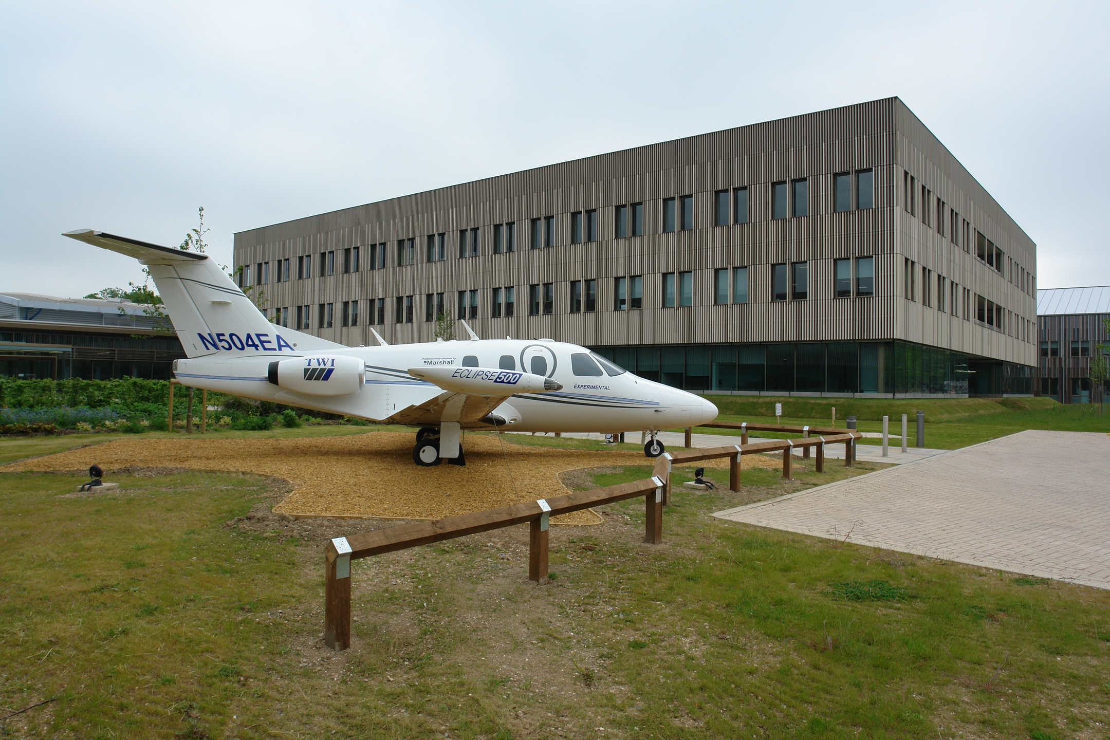 Friction stir welded Eclipse 500 Experimental Aircraft N504EA at TWI Ltd in Great Abington (UK)